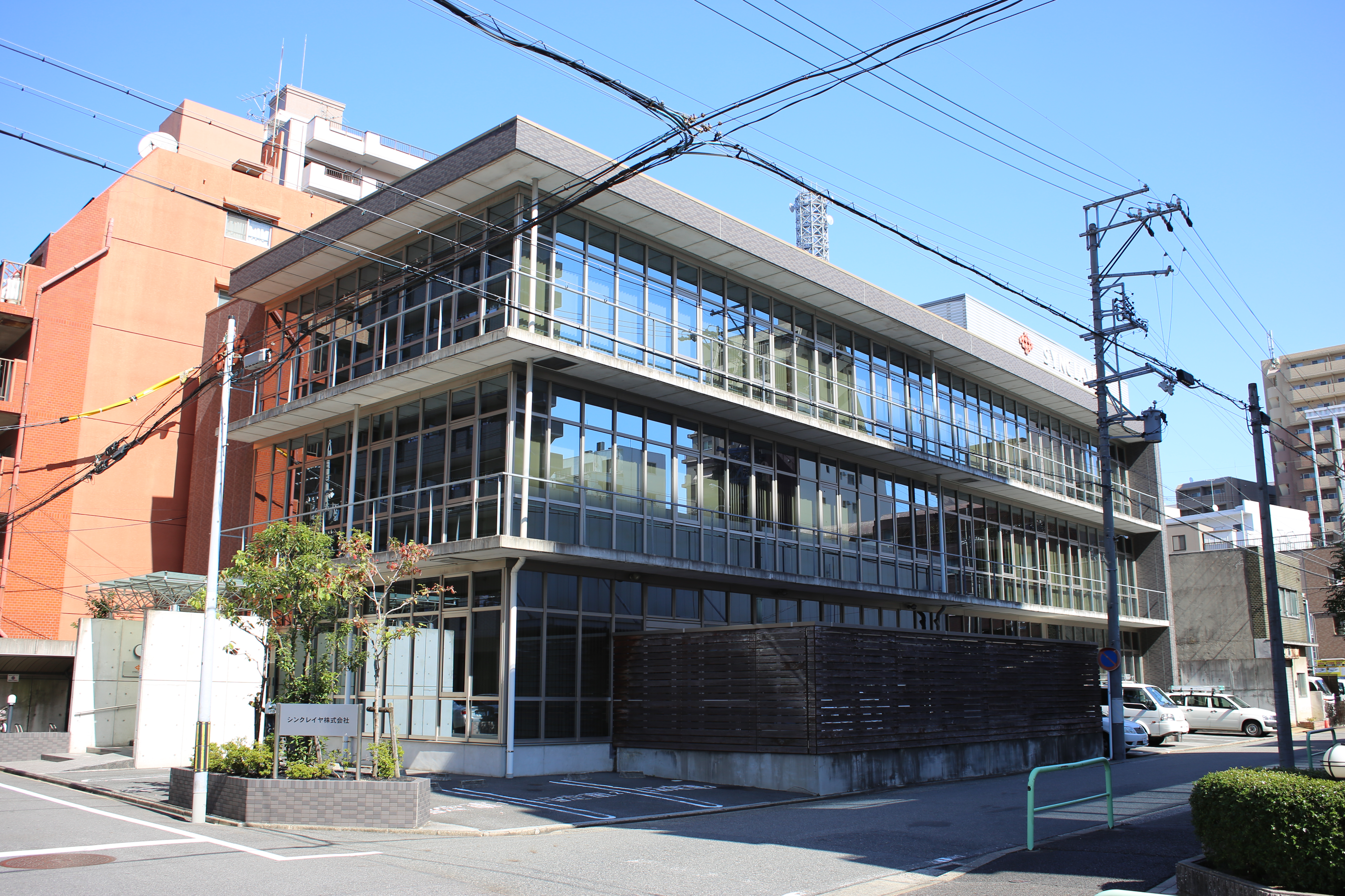 名古屋市中区千代田二丁目のシンクレイヤ本社を西側公道南側より撮影